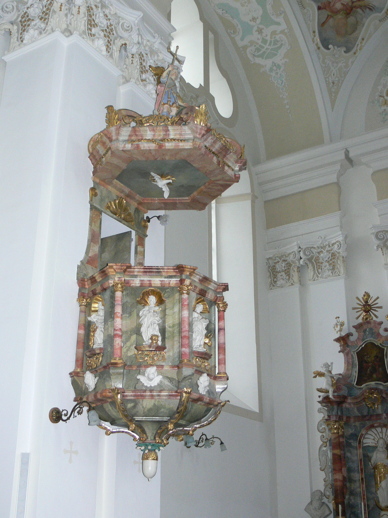 Bad Saulgau, Kloster Sießen, Klosterkirche, Kanzel